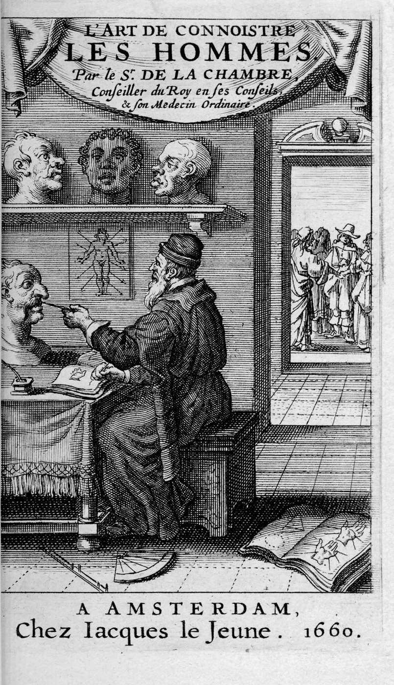 Titel: Marin Cureau de la Chambre: L'art de connoistre les hommes. Amsterdam, J. le Jeune (d. i. Elzevier), 1660.